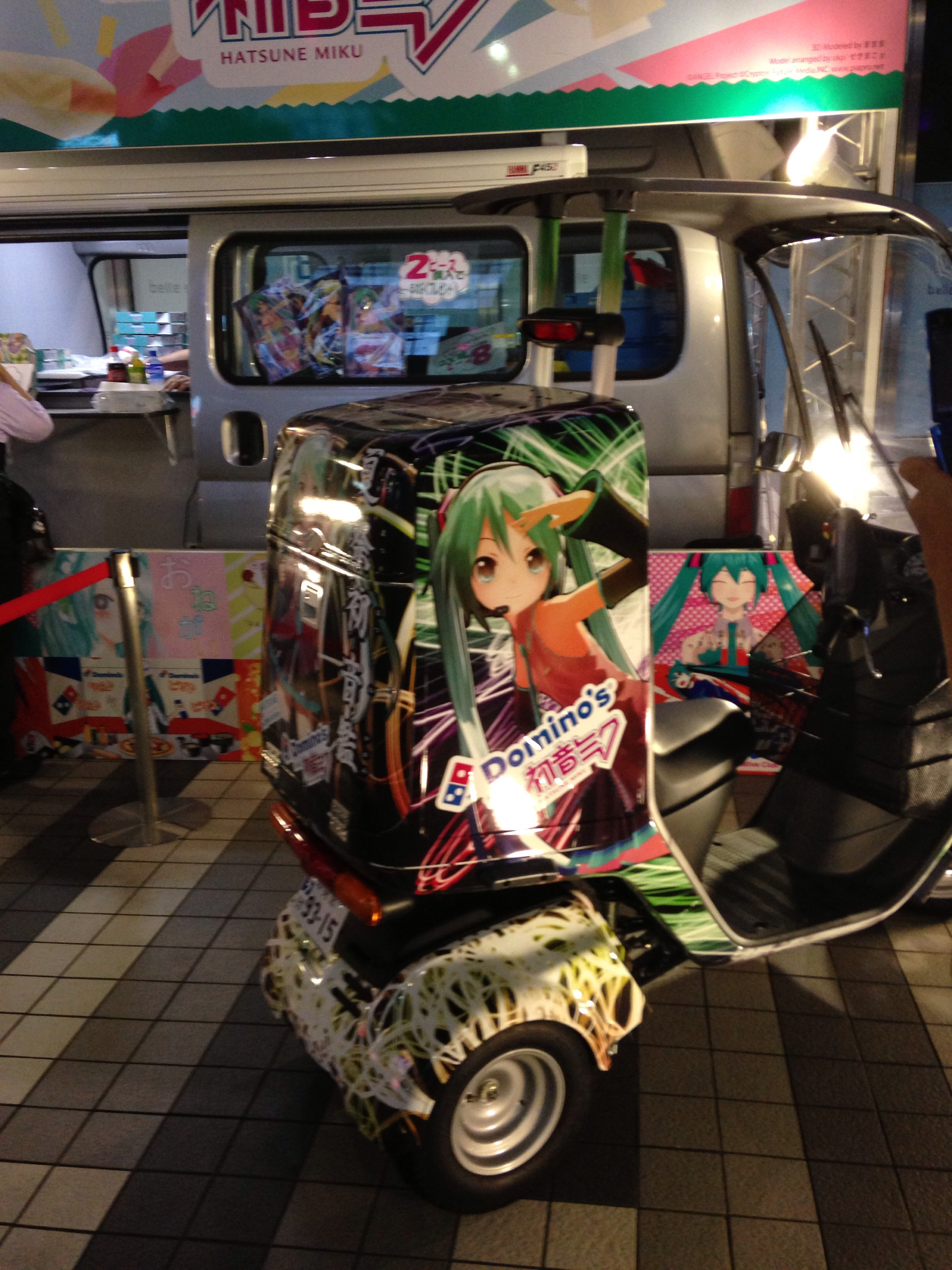 中文（台灣）: 日本達美樂披薩的初音未來外送痛機車。